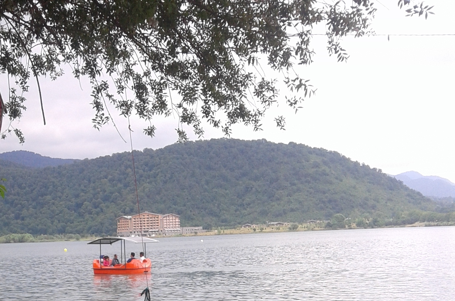 Nohurgöl